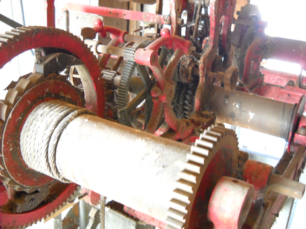 L'antico meccanismo dell'orologio della Torre del Duomo di Teramo